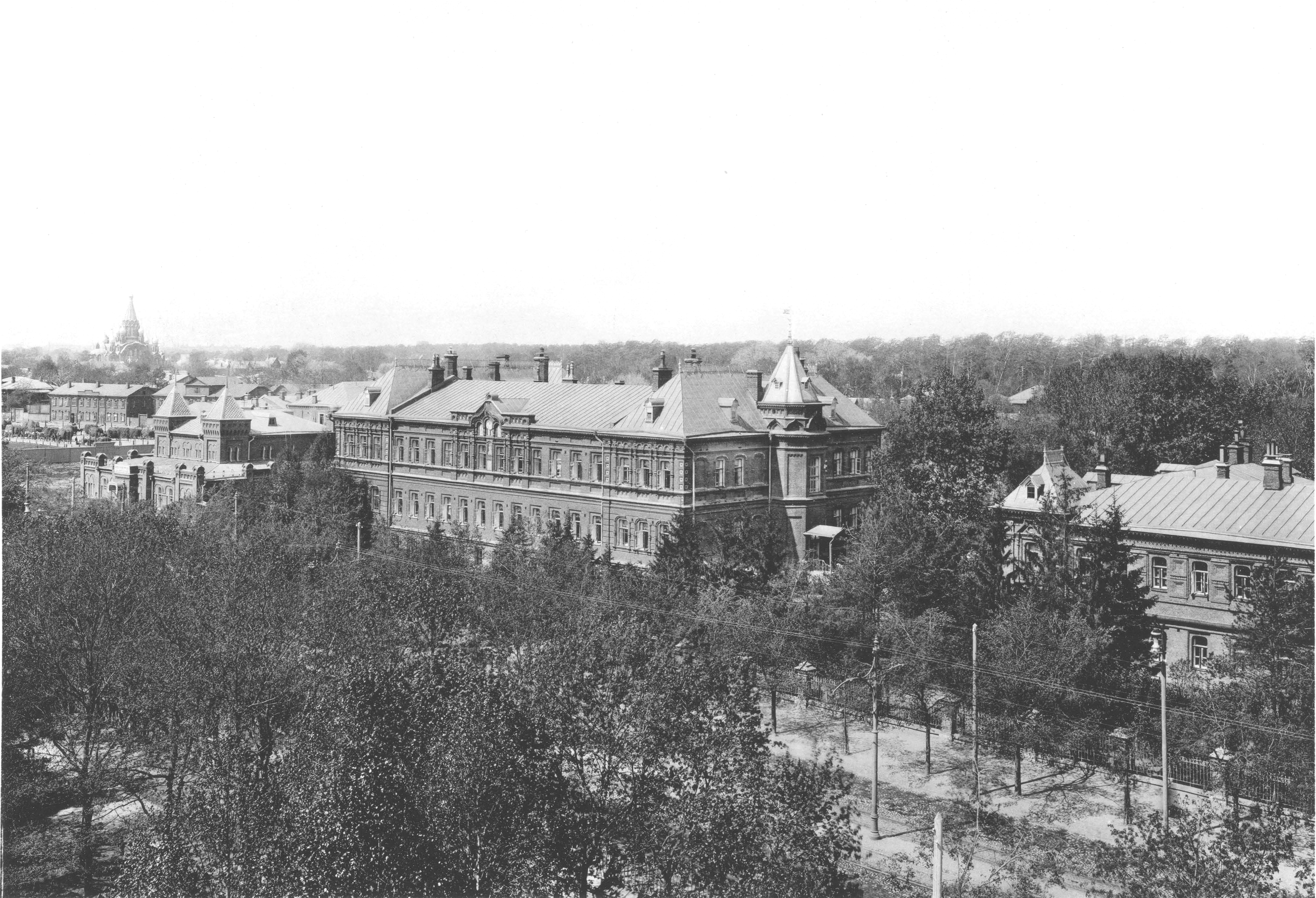 74. Больница и домъ призрЪнiя имени бр. Бахрушиныхъ на СтромынкЪ. (Москва)